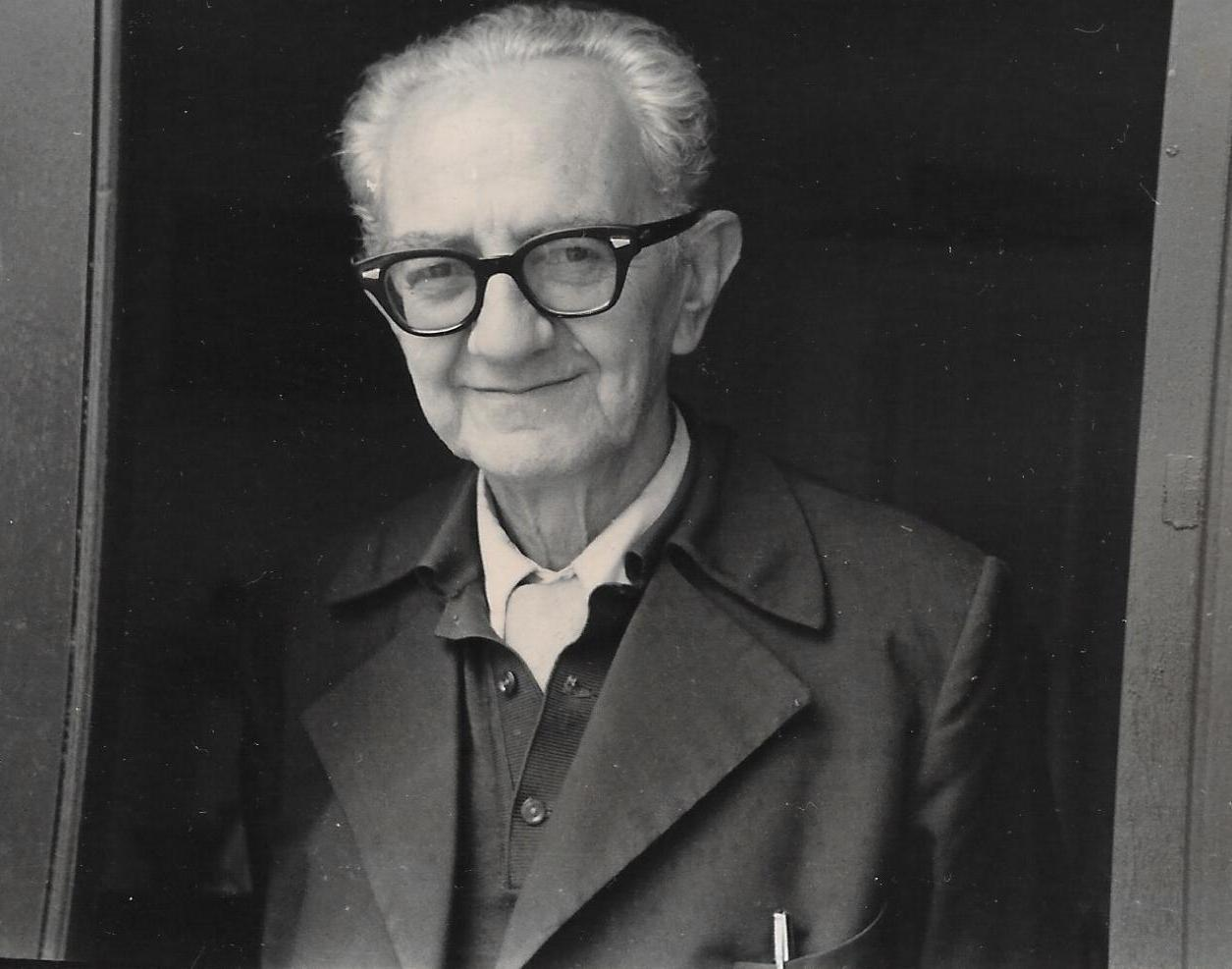 El antropólogo argentino Dick Edgar Ibarra Grasso, en una fotografía de Jorge Cappato, circa 1980